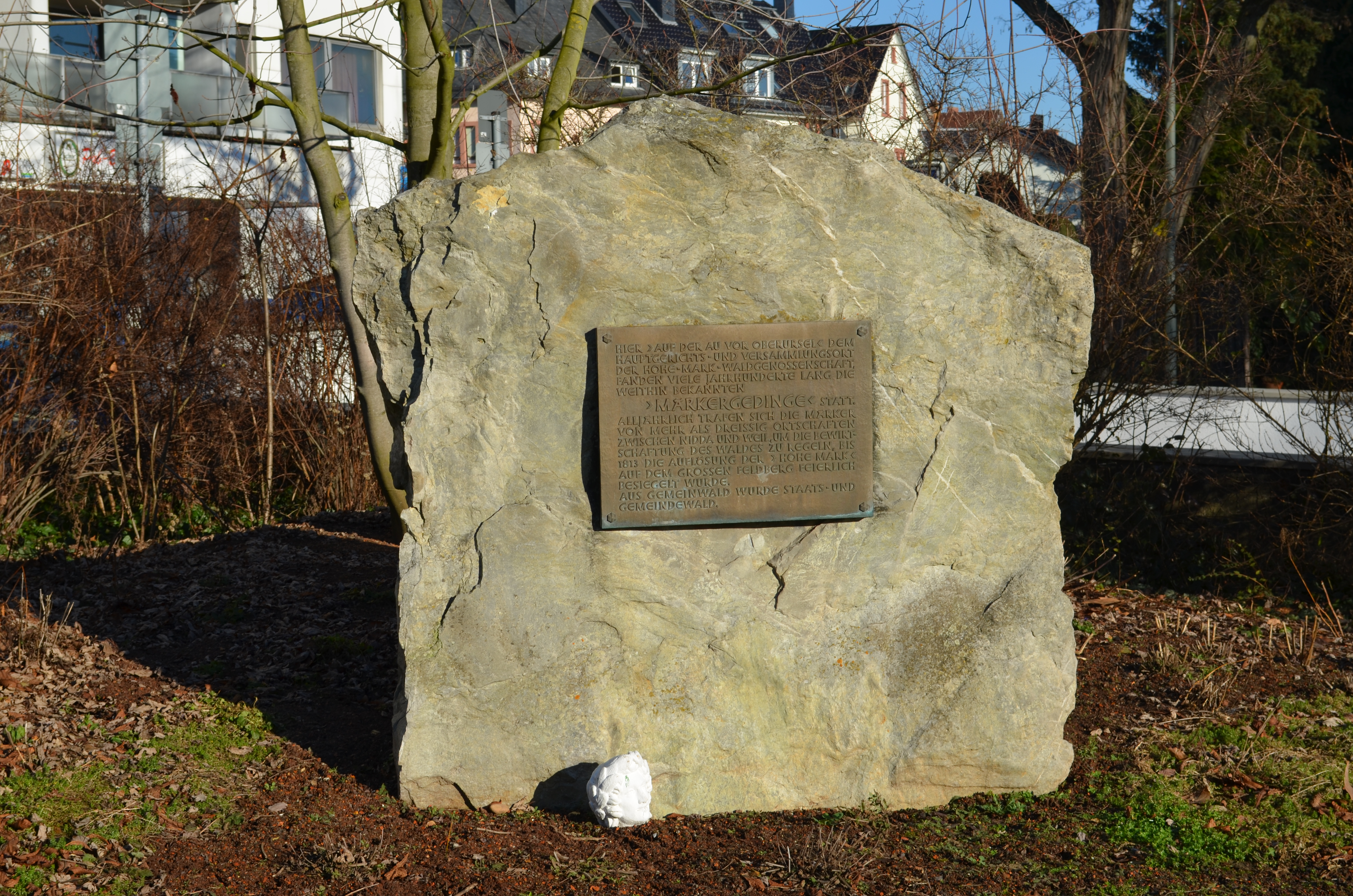 Oberursel, Adenauerallee, Geenkstein Märkergeding